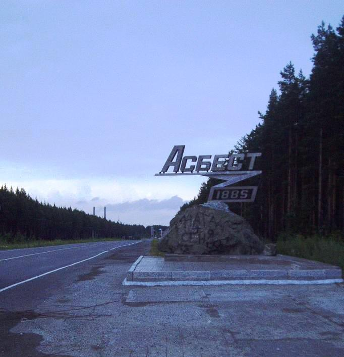 Asbest city sign. Location: Asbest, Sverdlovsk Oblast, Russia